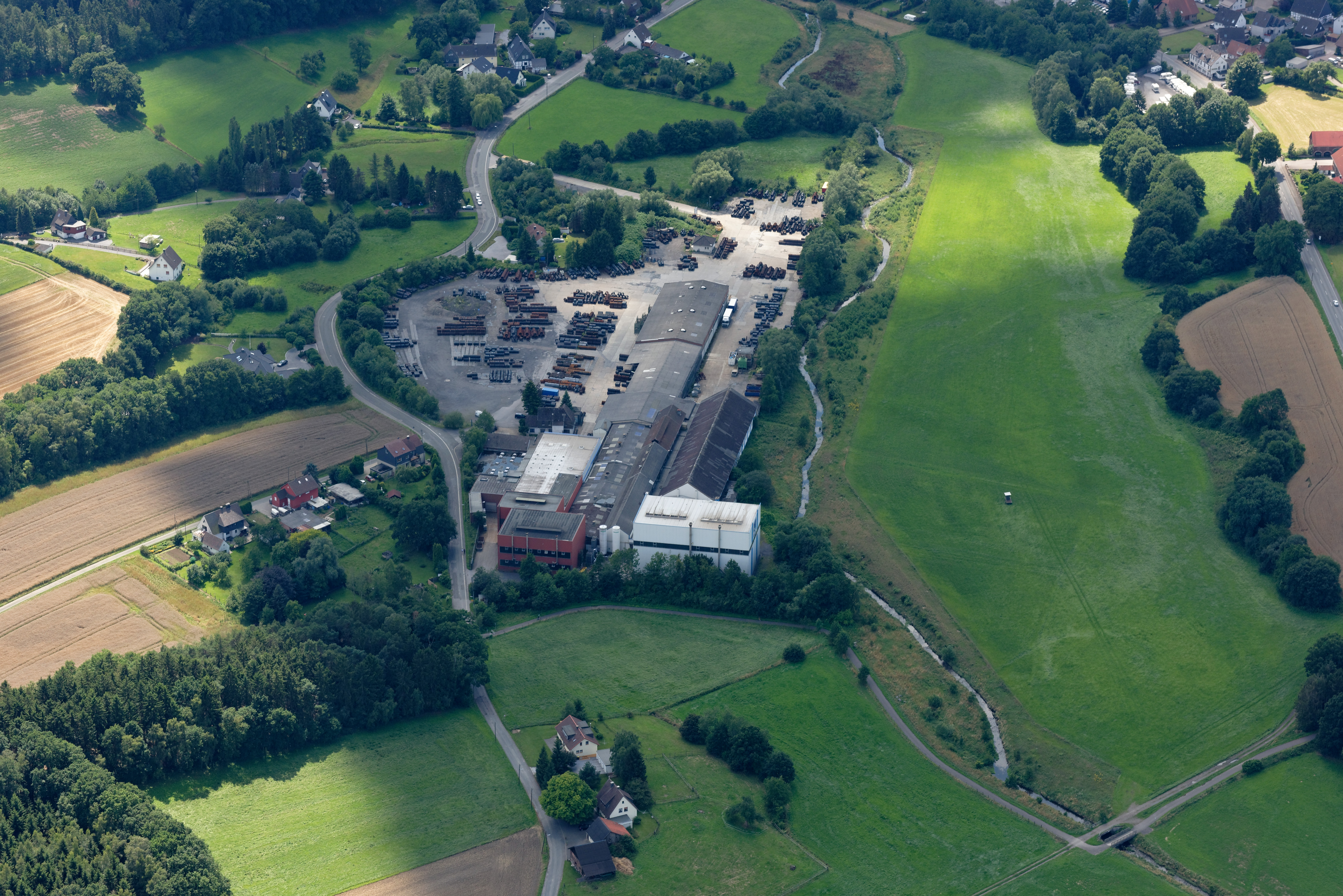 Luftaufnahme: Werksgelände der Fa. Westfälische Drahtindustrie (WDI) bei Iserlohn-Kalthof, Bundesstraße 233, Baarbach, Nordrhein-Westfalen